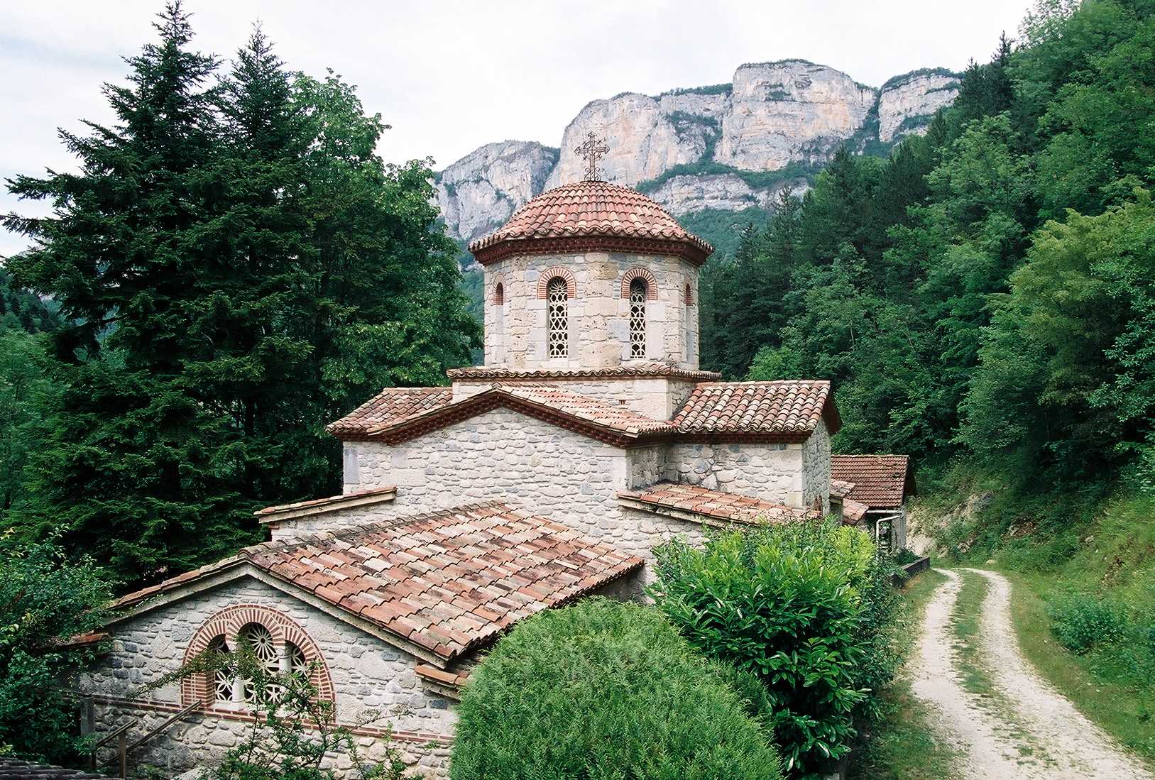 Монастырь святого Антония Великого в Дроме (Франция), подворье афонского монастыря Симонопетра.